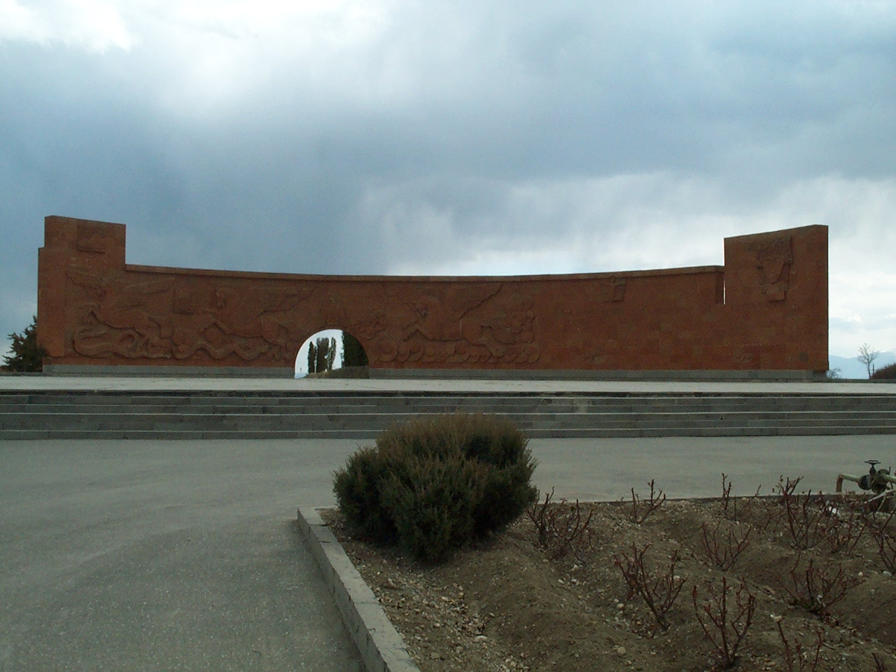 ՀՈՒՇԱՀԱՄԱԼԻՐ՝ ՍԱՐԴԱՐԱՊԱՏԻ ՃԱԿԱՏԱՄԱՐՏԻ ՀԵՐՈՍՆԵՐԻ 59/3